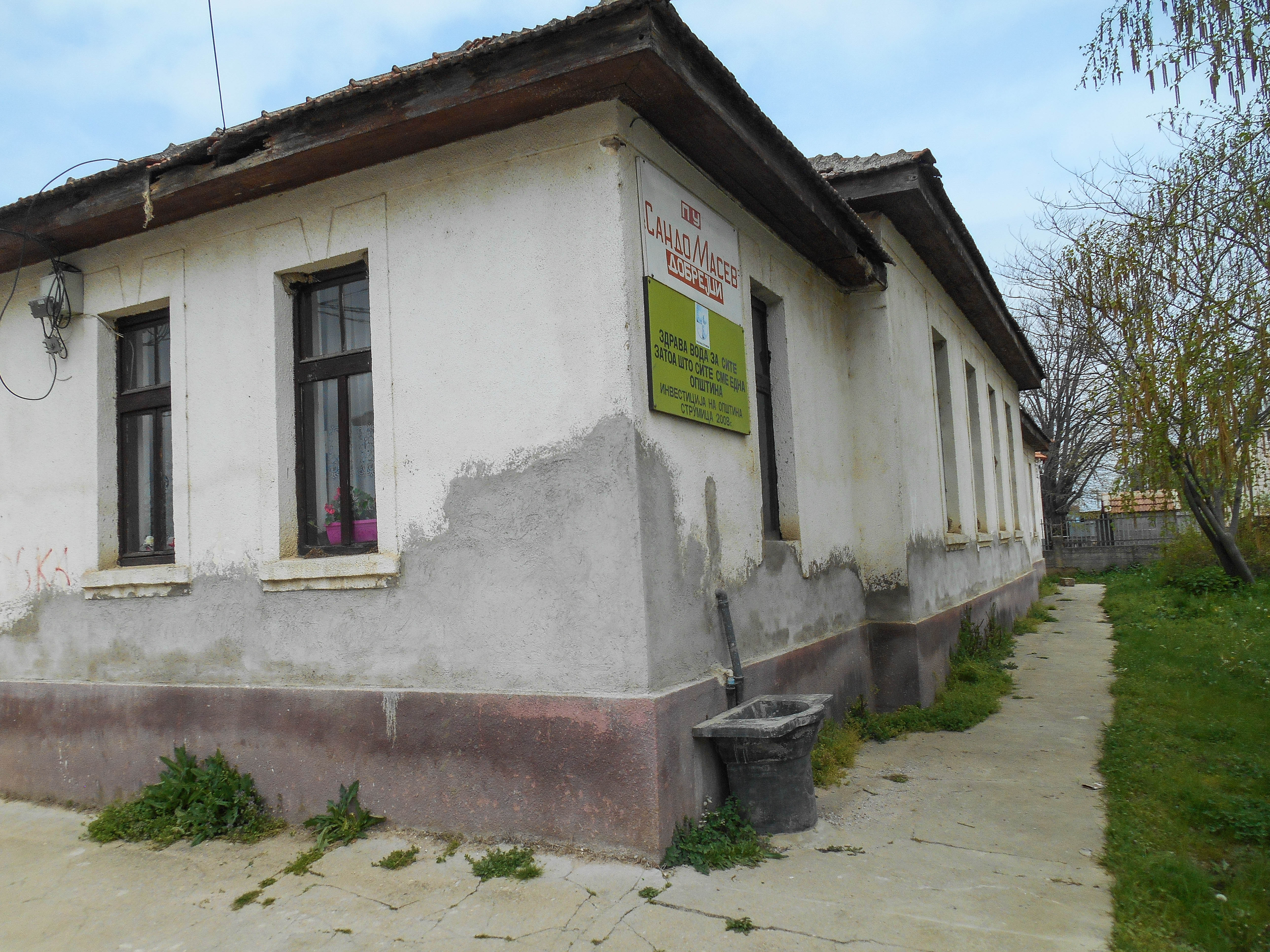 Училиште Сандо Масев - Добрејци